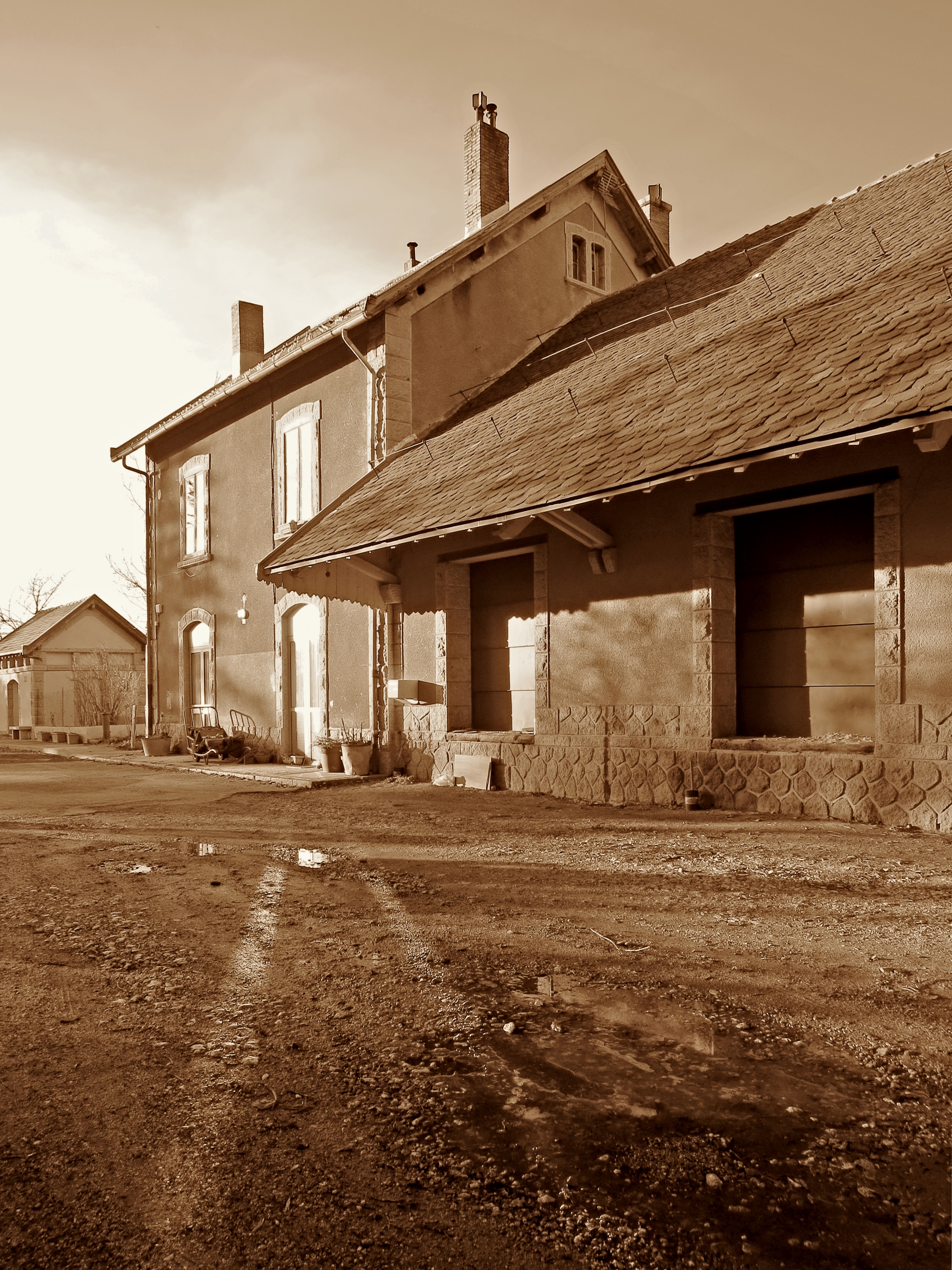 Osséja (Pyrénées-Orientales, France) - Gare d'Osséja.